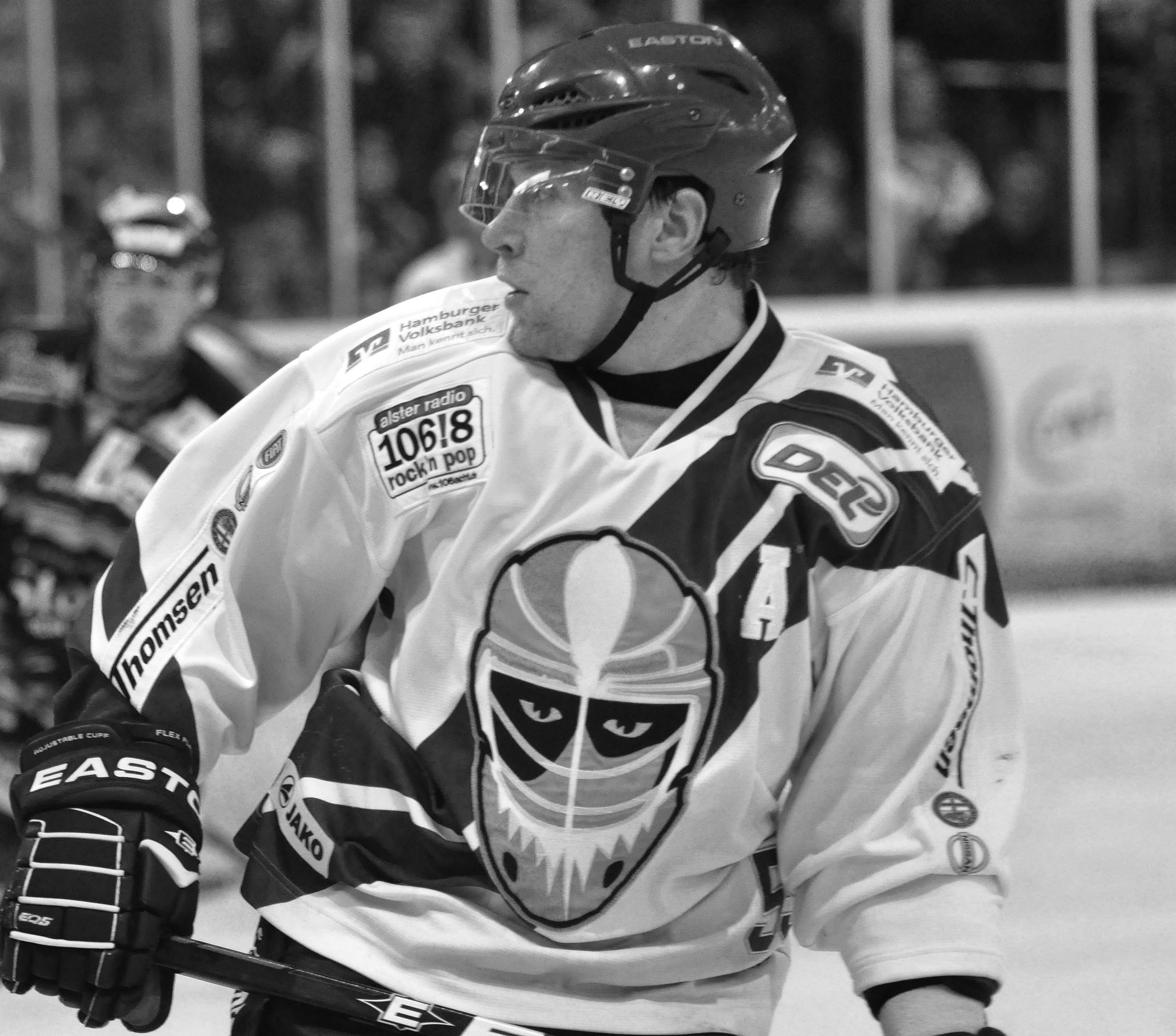 Straubing Tigers - Hamburg Freezers 26.02.2012 DEL Deutsche Eishockey Liga